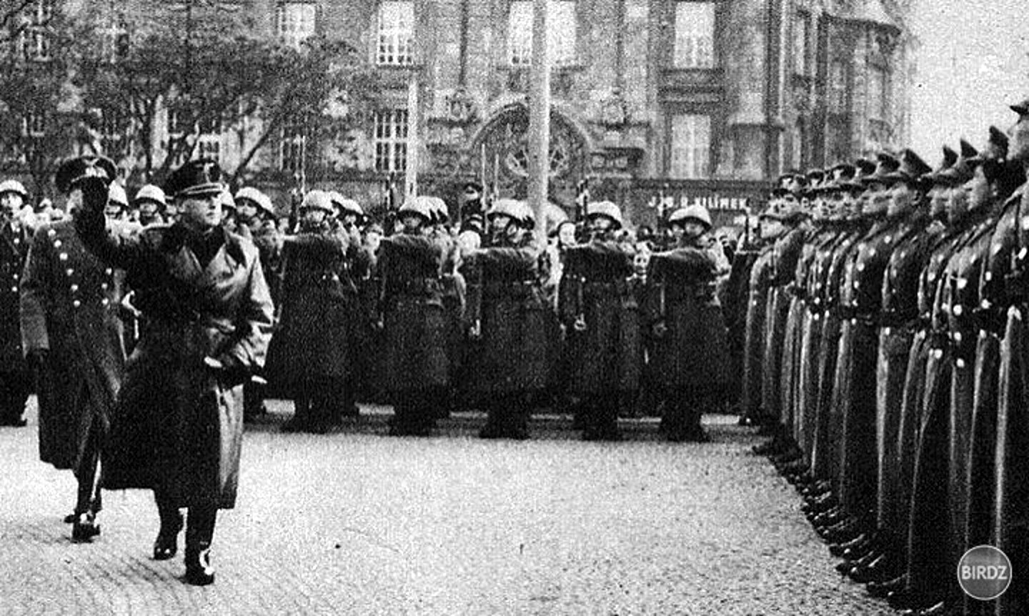 Alexander Mach (1902 – 1980), politik, hlavný veliteľ Hlinkovej gardy, podpredseda vlády a minister vnútra v období vojnovej Slovenskej republiky (1939-1945). Za zločiny proti ľudskosti, roku 1947 odsúdený na 30 rokov väzenia. Digitalizácia fotografie z dobovej tlače.